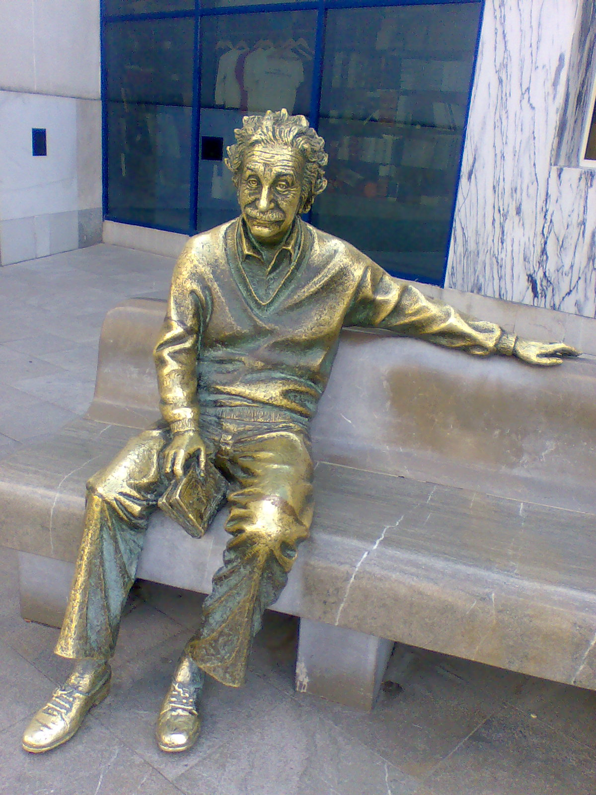 Estatua dedicada a Albert Einstein ubicada en el Museo de las Ciencias de Granada. Obra de Miguel Barranco López.